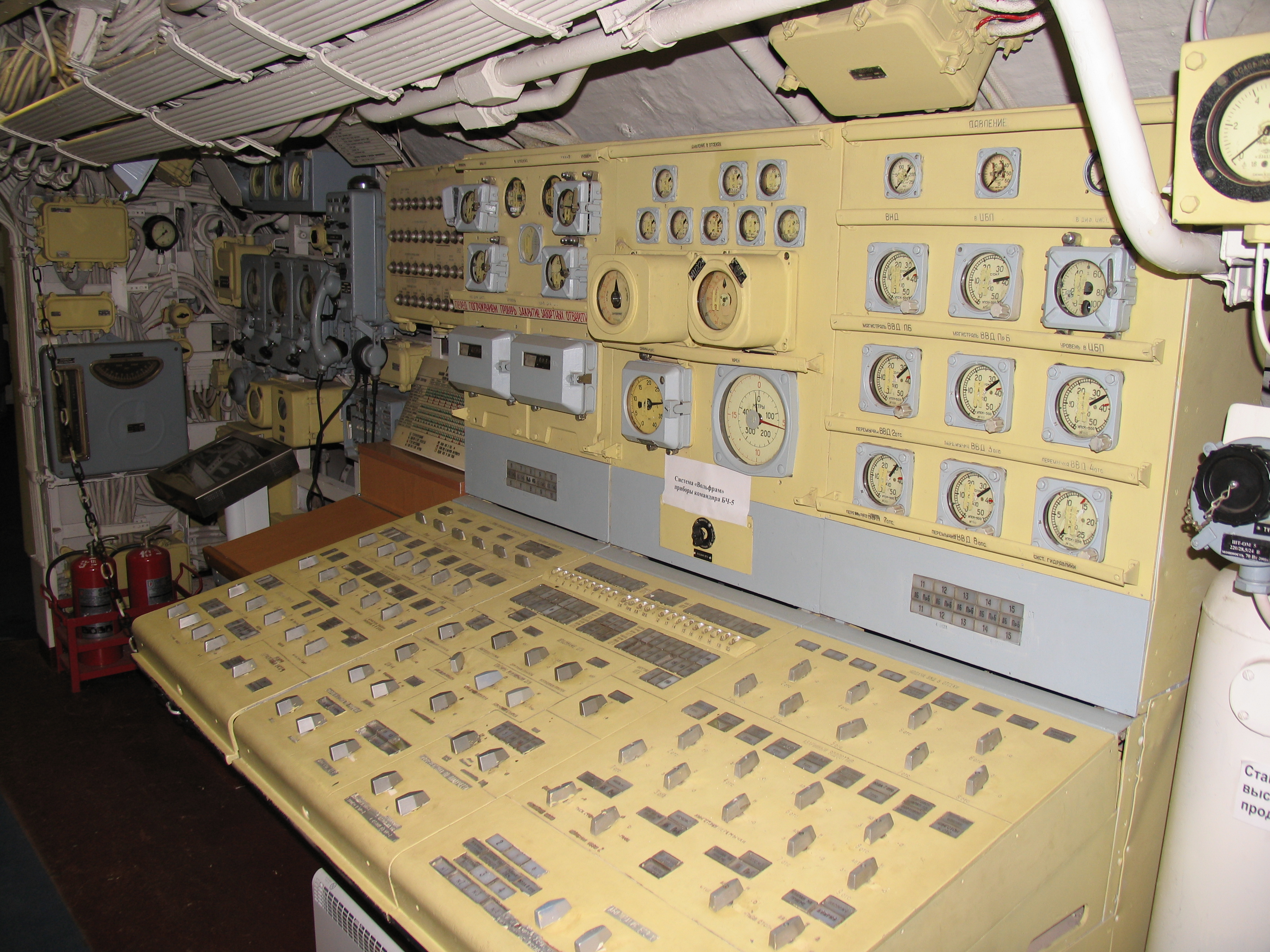 Подводная лодка Б-396. Третий отсек. Пост БЧ-5. Пульт управления движением ПЛ.